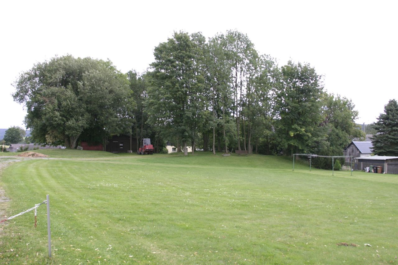 Thierbach Schlossberg